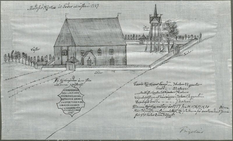 Madesjö gamla kyrka från sydväst, riven 1757. Teckning av Petrus Frigelius 1747, kopierad av Fabian Baehrendtz ca 1900. Original i Stifts- och gymnasiebiblioteket i Kalmar. Motiv: Madesjö gamla kyrka Kategori: (01) Exteriörer, TeckningMadesjö gamla kyrka från sydväst, riven 1757. Teckning av Petrus Frigelius 1747, kopierad av Fabian Baehrendtz ca 1900. Original i Stifts- och gymnasiebiblioteket i Kalmar.